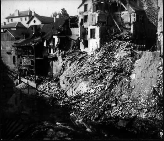 Le pont enjambant le Guiers entre les deux villes de Pont-de-Beauvoisin, détruit en 1940